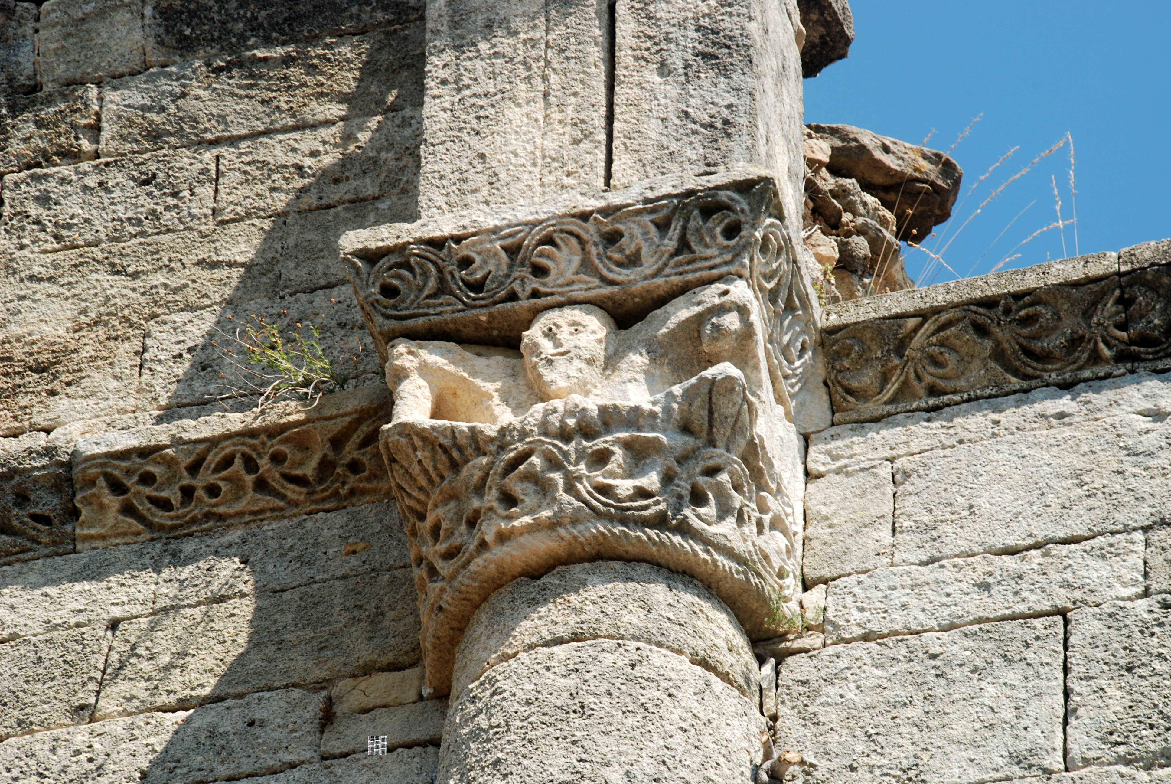 France - Gard - Église Saint-André de Souvignargues